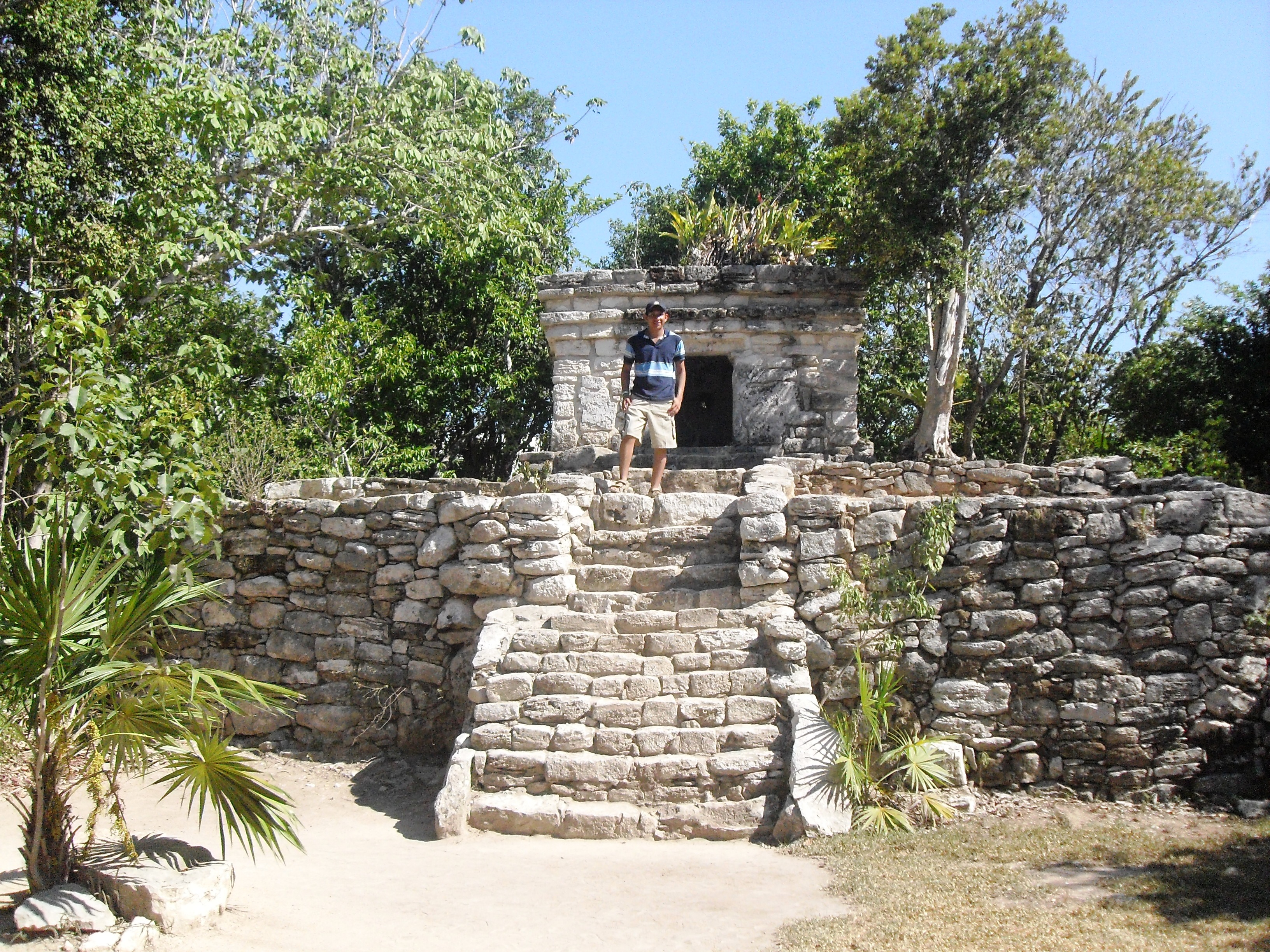 Zona Arqueologica de Xcaret